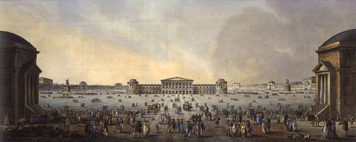 Veduta del Foro Buonaparte e del Castello (lato Francia), secondo il progetto dell'Antolini